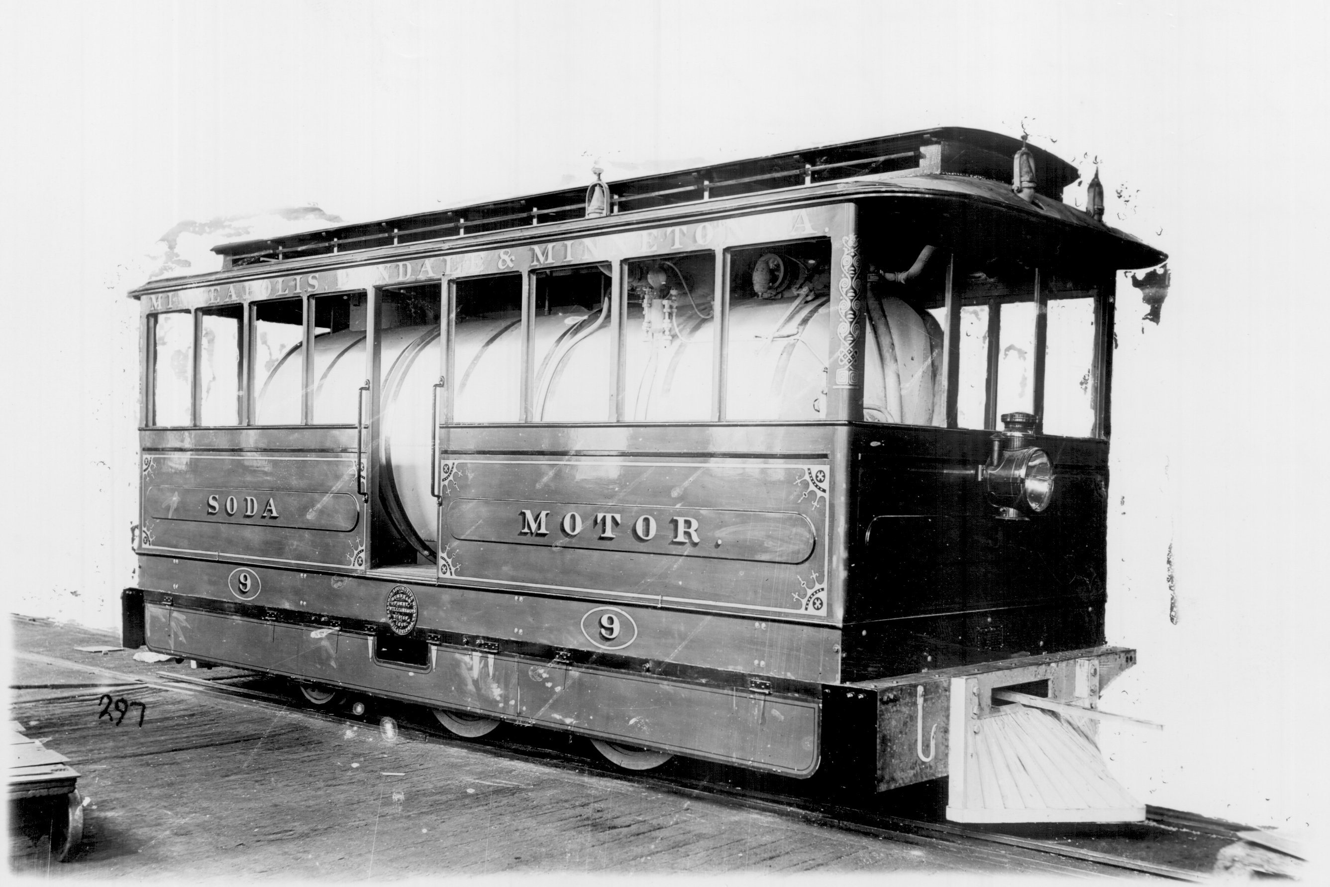 Minneapolis, Lyndale, and Minnetonka Railway "soda motor" by Walter F. Becker of St. Paul, from between 1886 and 1891.